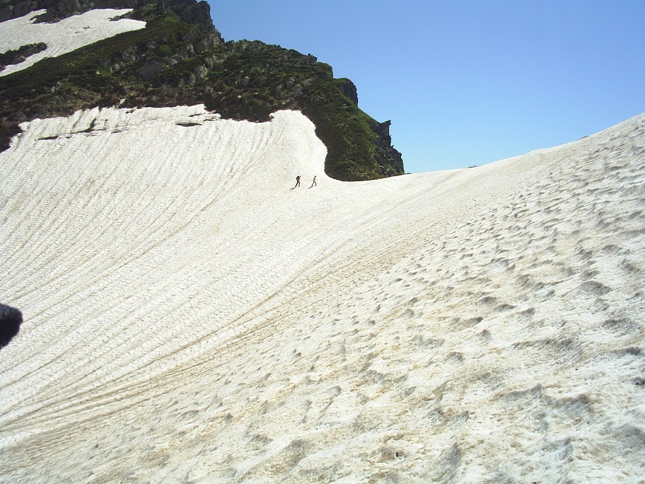 Подъём на Ачишхо